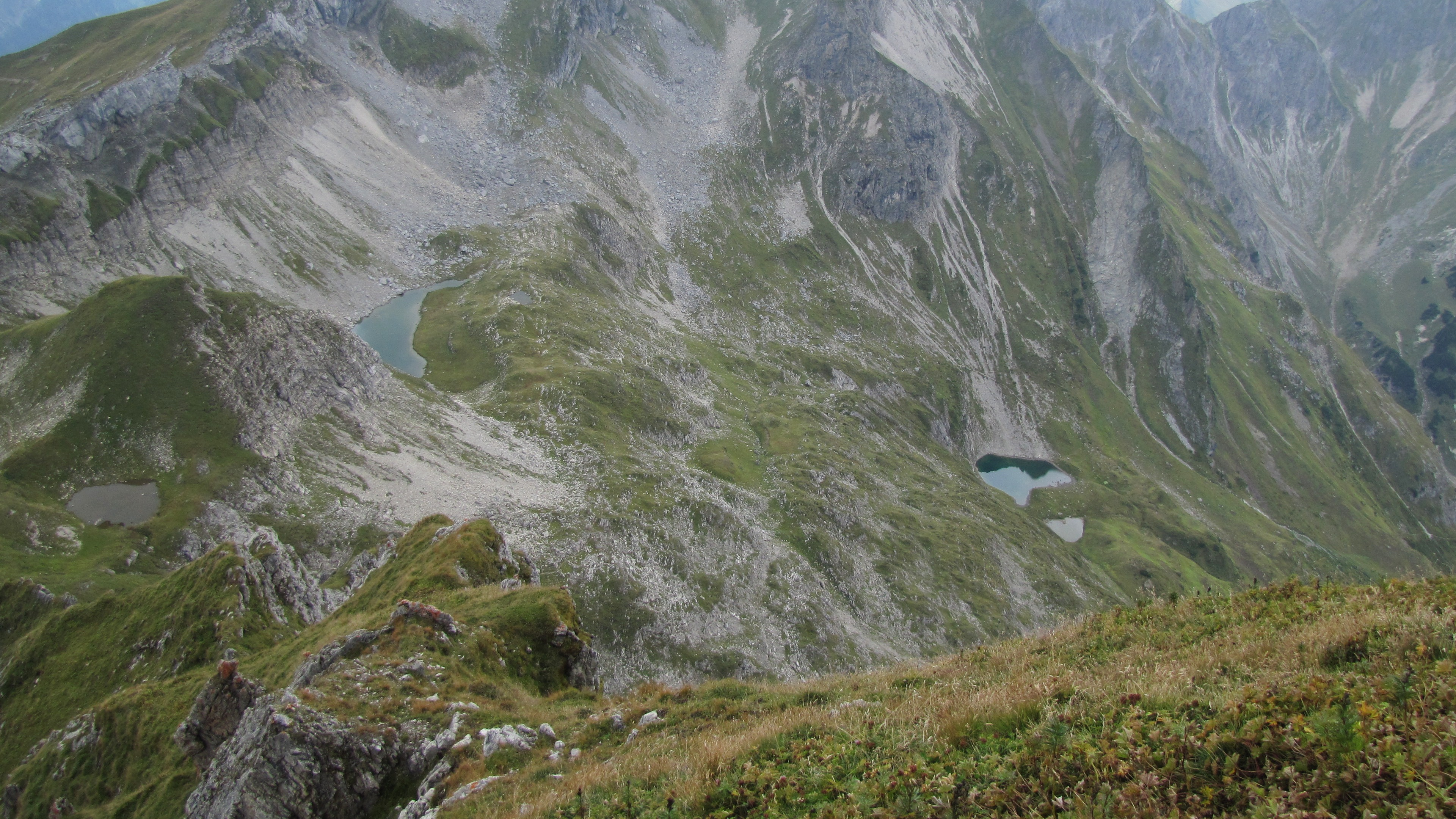 Blick von der Hochkünzelspitze auf die Seen, die das Vorarlberger Biotop #23317 bilden.